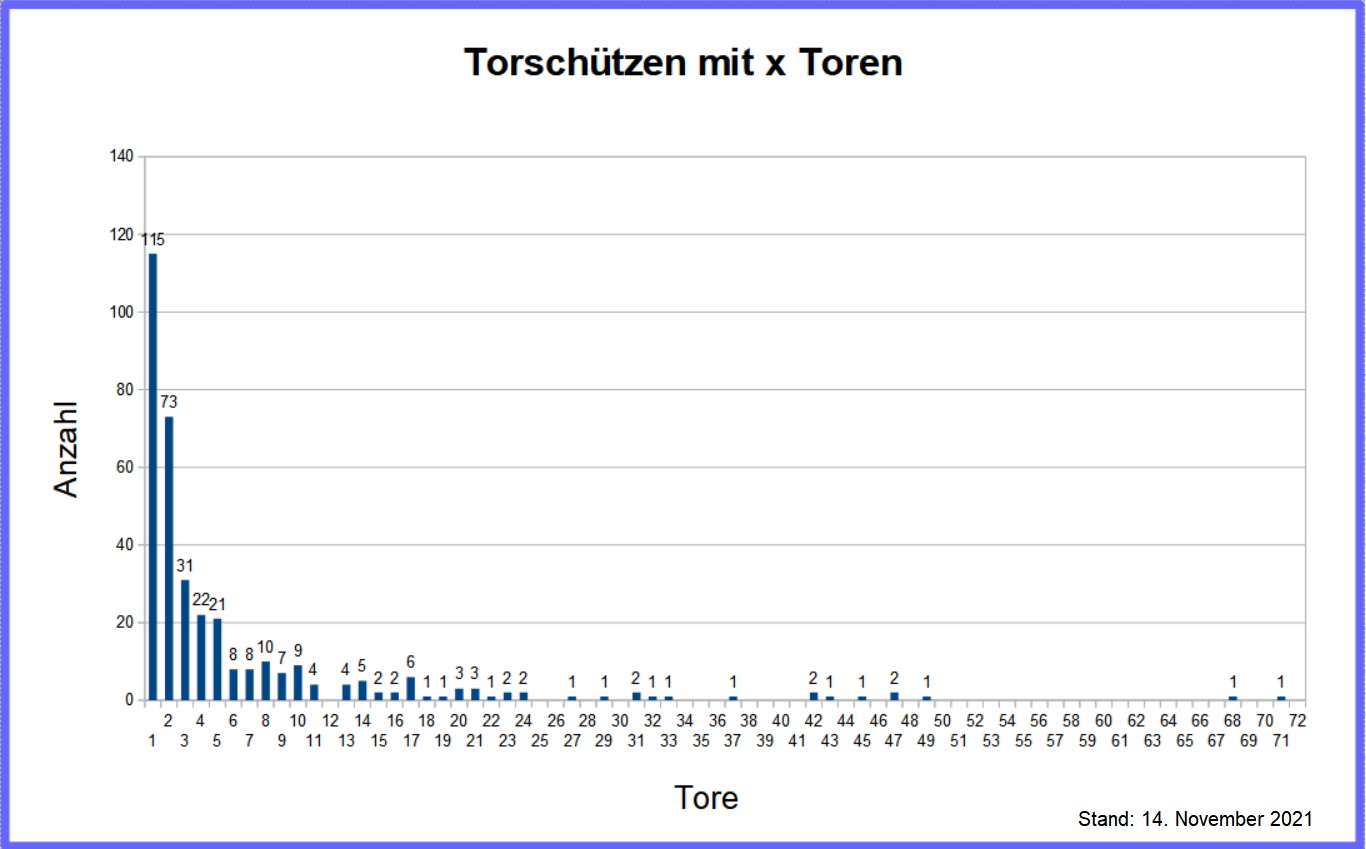 Anzahl der Torschützen der deutschen Fußballnationalmannschaft, Stand 7.7.2016